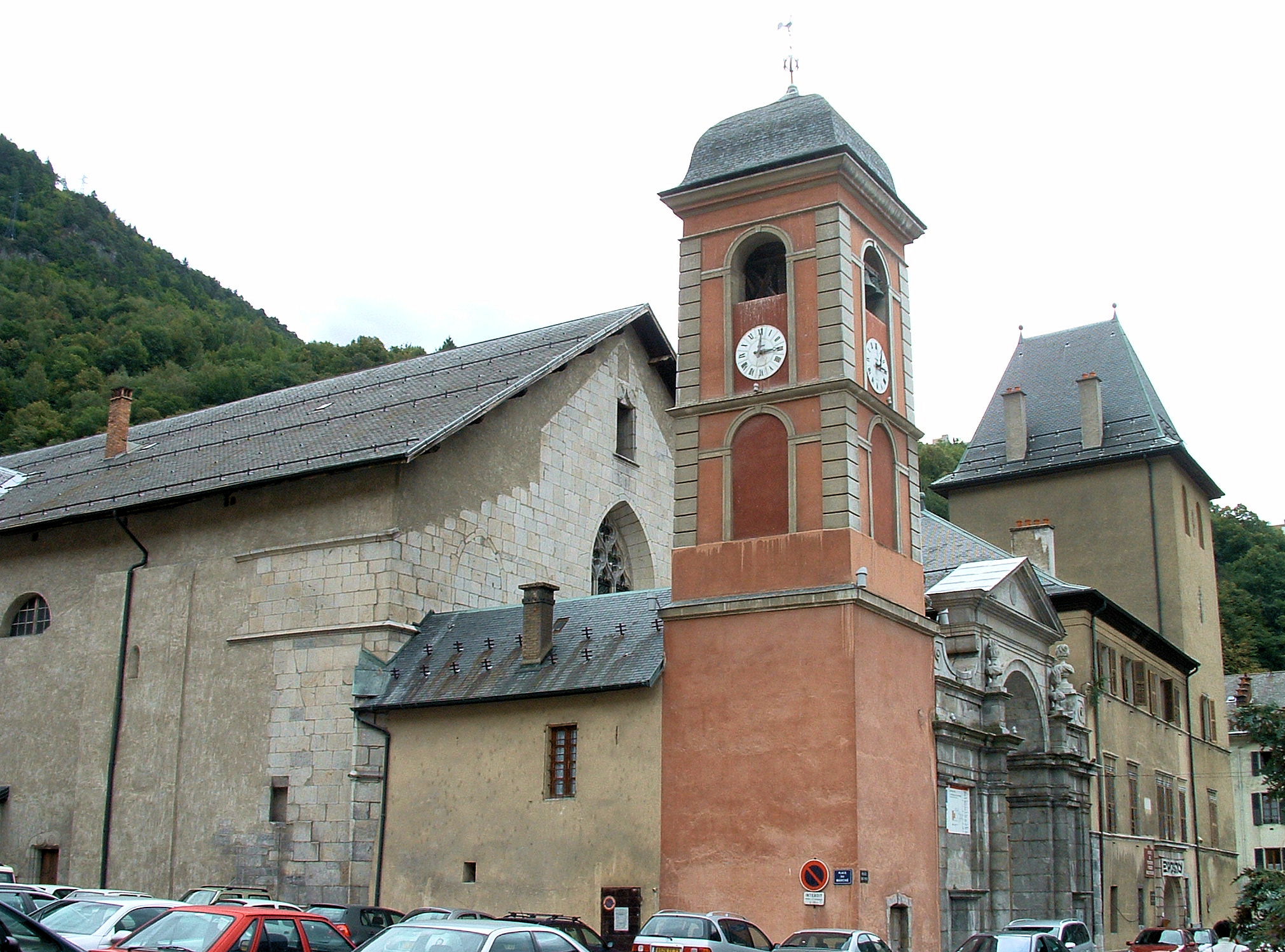 Moûtiers - Cathédrale Saint-Pierre